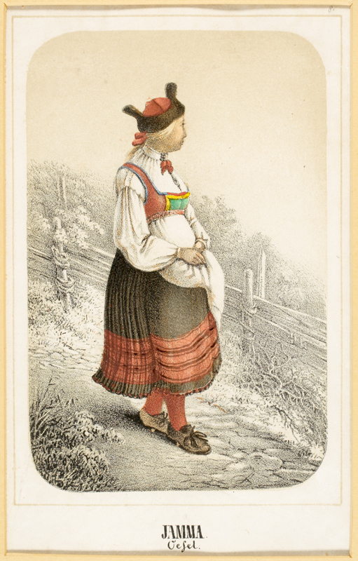 Värviline litograafia MuuseumikoguKunstiesemed OriginaaloriginaalSäilivusmääramata legend Värviline lito